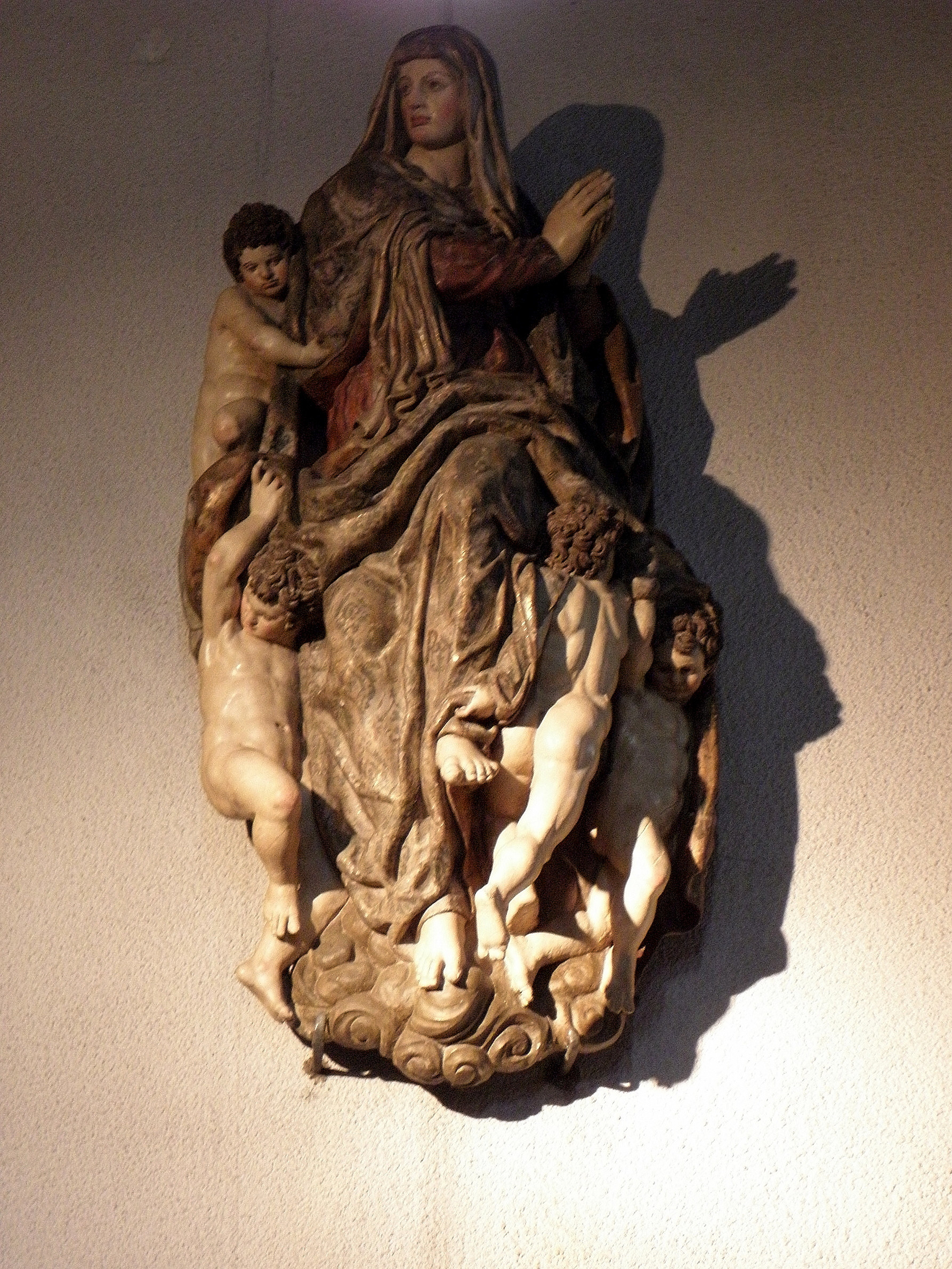 Intérieur de la basilique Notre-Dame d'Arcachon (33). Groupe de l'Assomption.